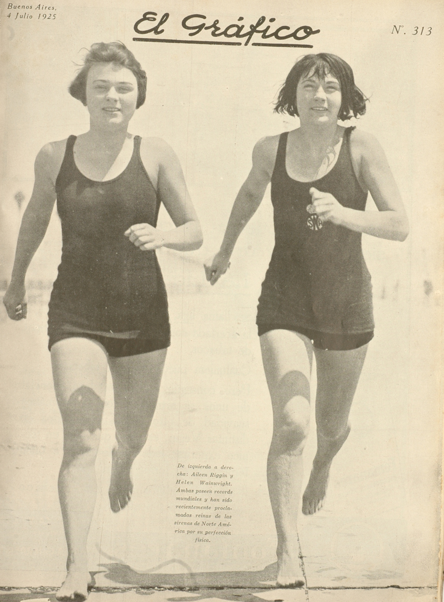 El Grafico del 04 de Julio de 1925. Edicion 313